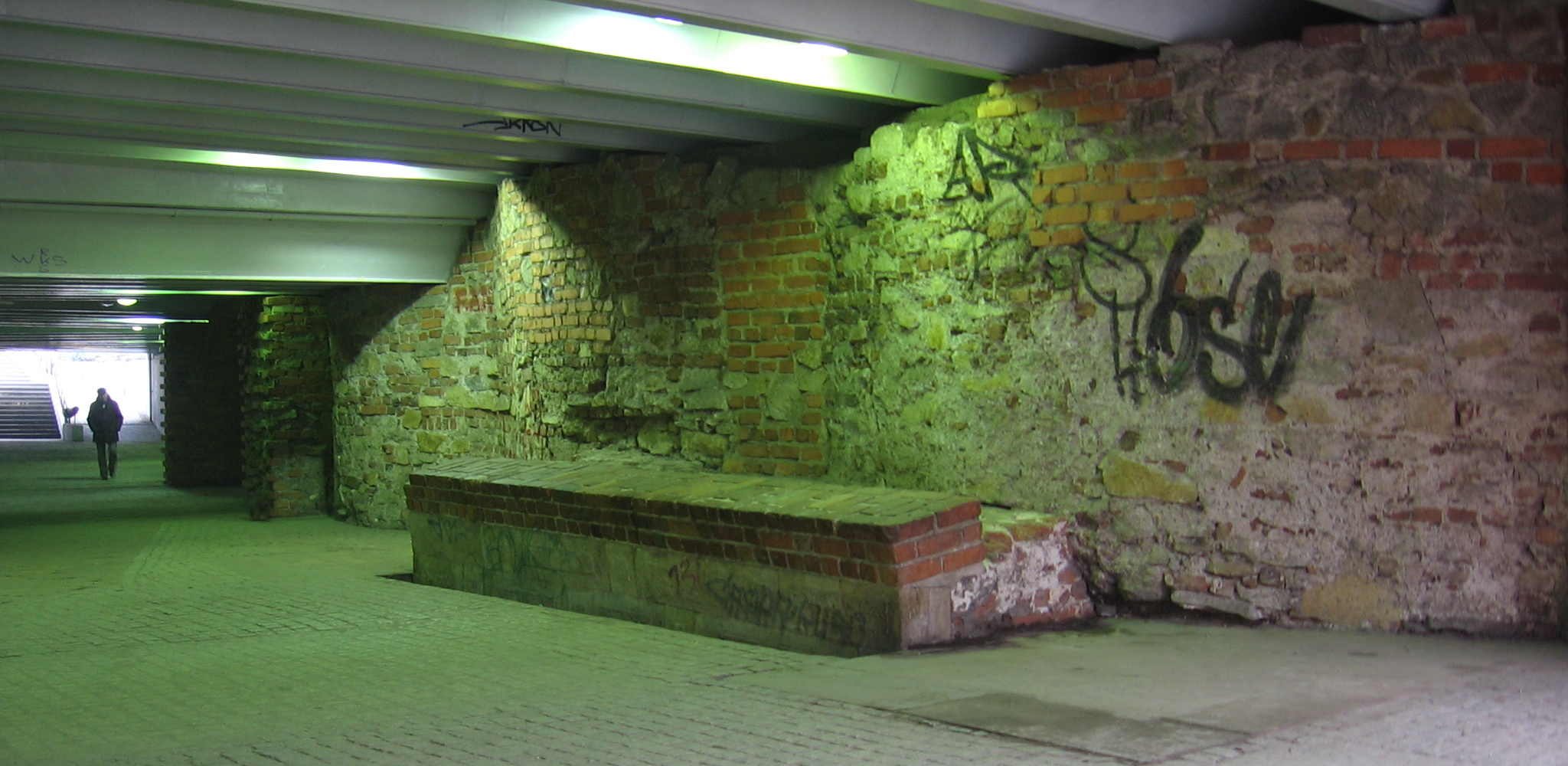 Reste der Breslauer Stadtbefestigung. Mauer der Tunneltor-Bastion (1576/77, Bernardo Nurion) am Tor "Brama Olawska" (Ohlauer Tor), Unterführung der promenada Staromiejska (Altstadtpromenade) unter der ul. Oławska (Ohlauer Strasse), Wrocław (Breslau), Niederschlesien, Polen.